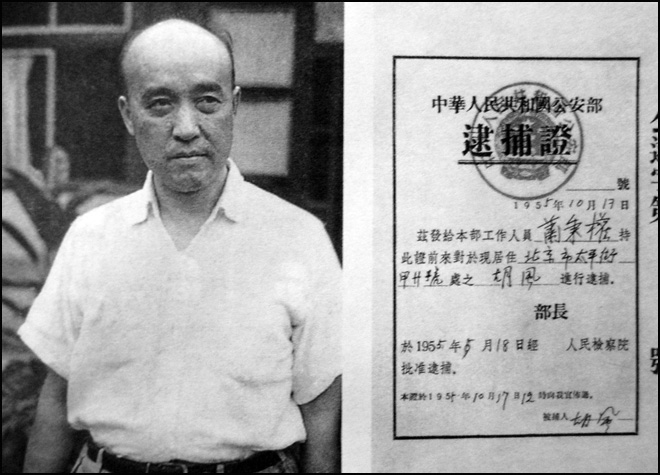 1950年的胡风和1955年的逮捕证